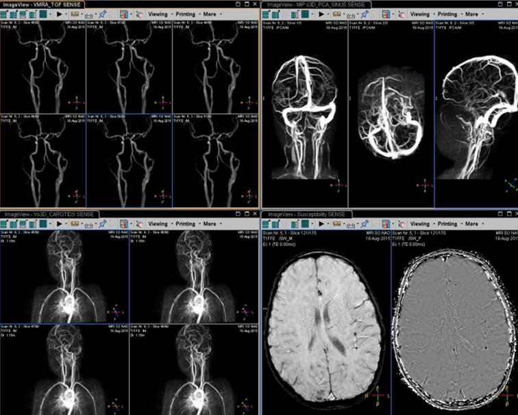 MRI mạch máu với Gadovist